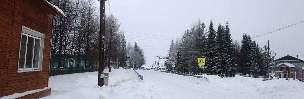 Деревня Гам Ижемского района Республики Коми